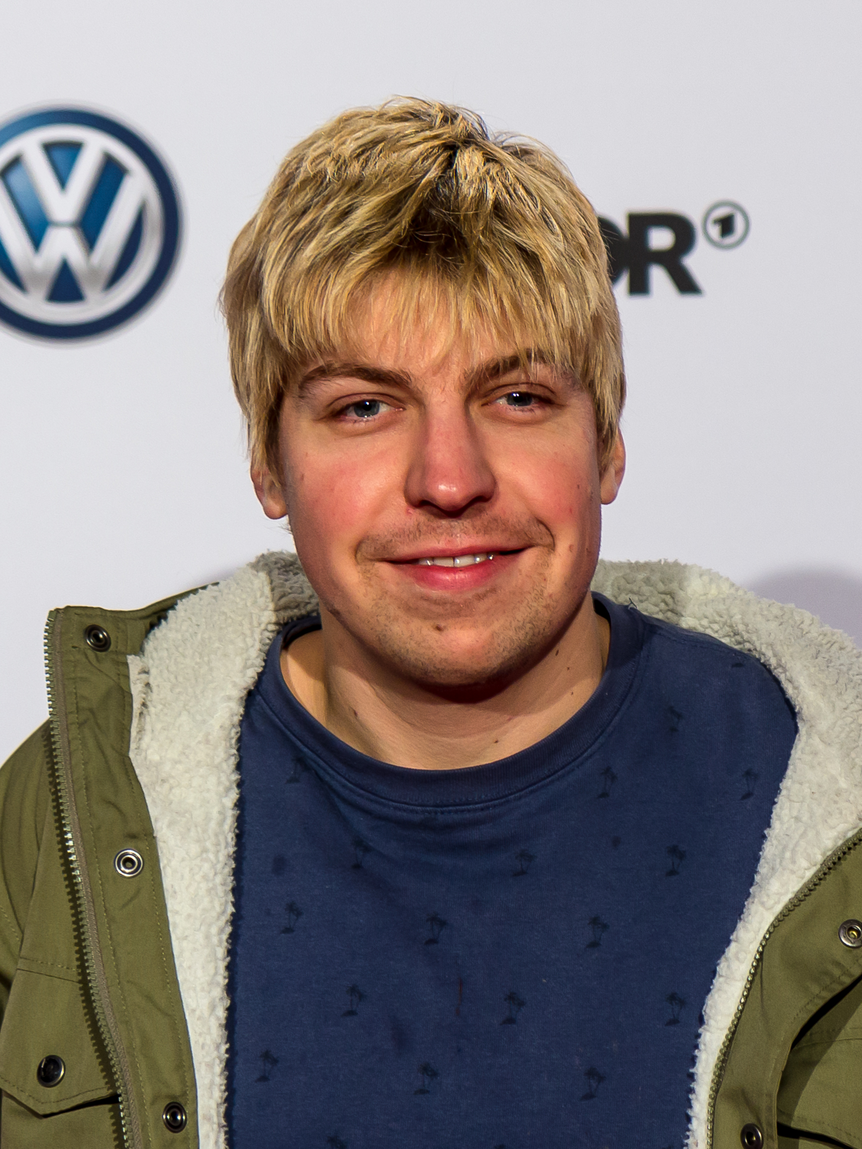 1LIVE Krone 2016 - 1700 - Roter Teppich - Philipp Poisel